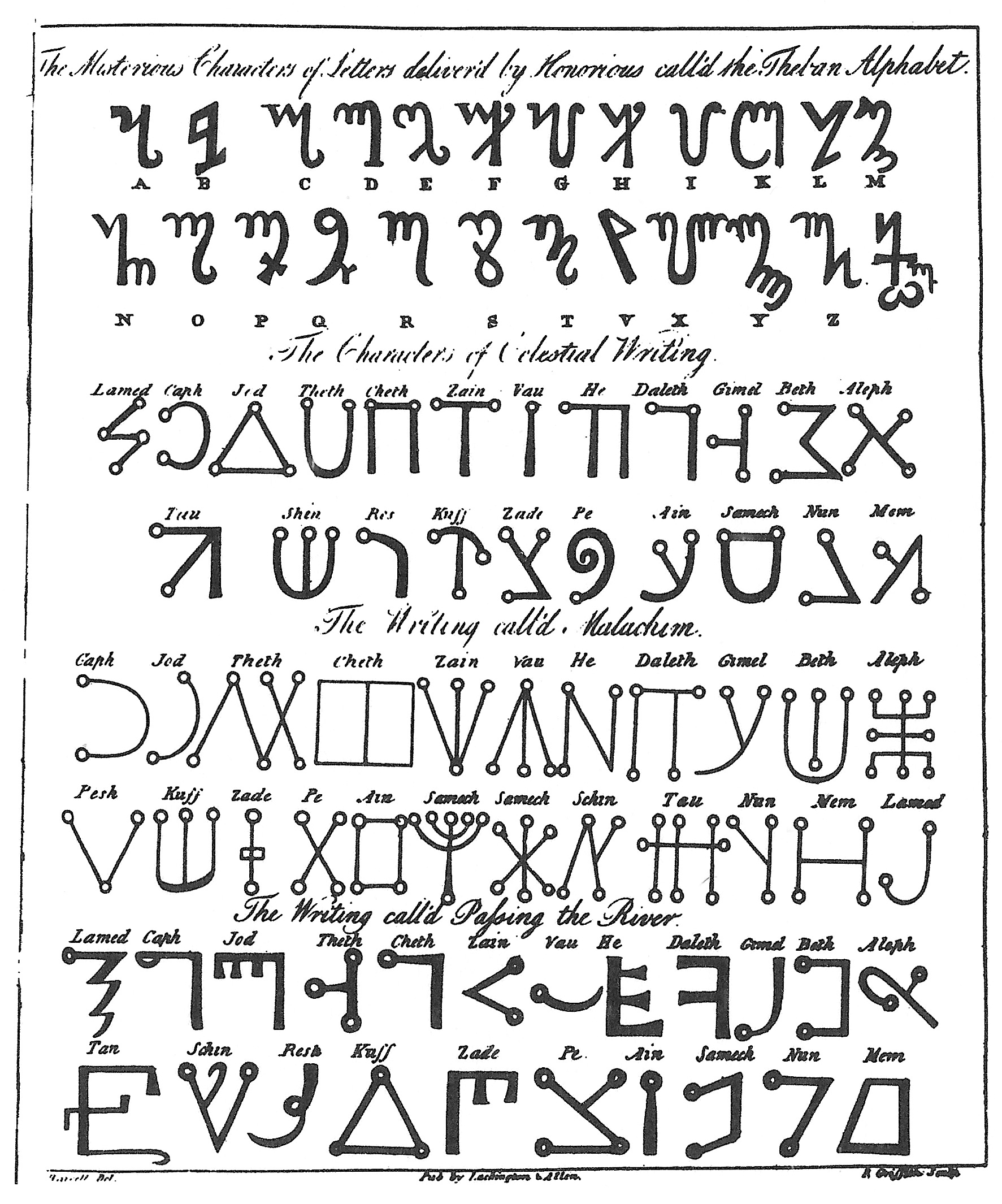 Magische Alphabete aus dem Buch "The Magus" (1801) von Francis Barrett